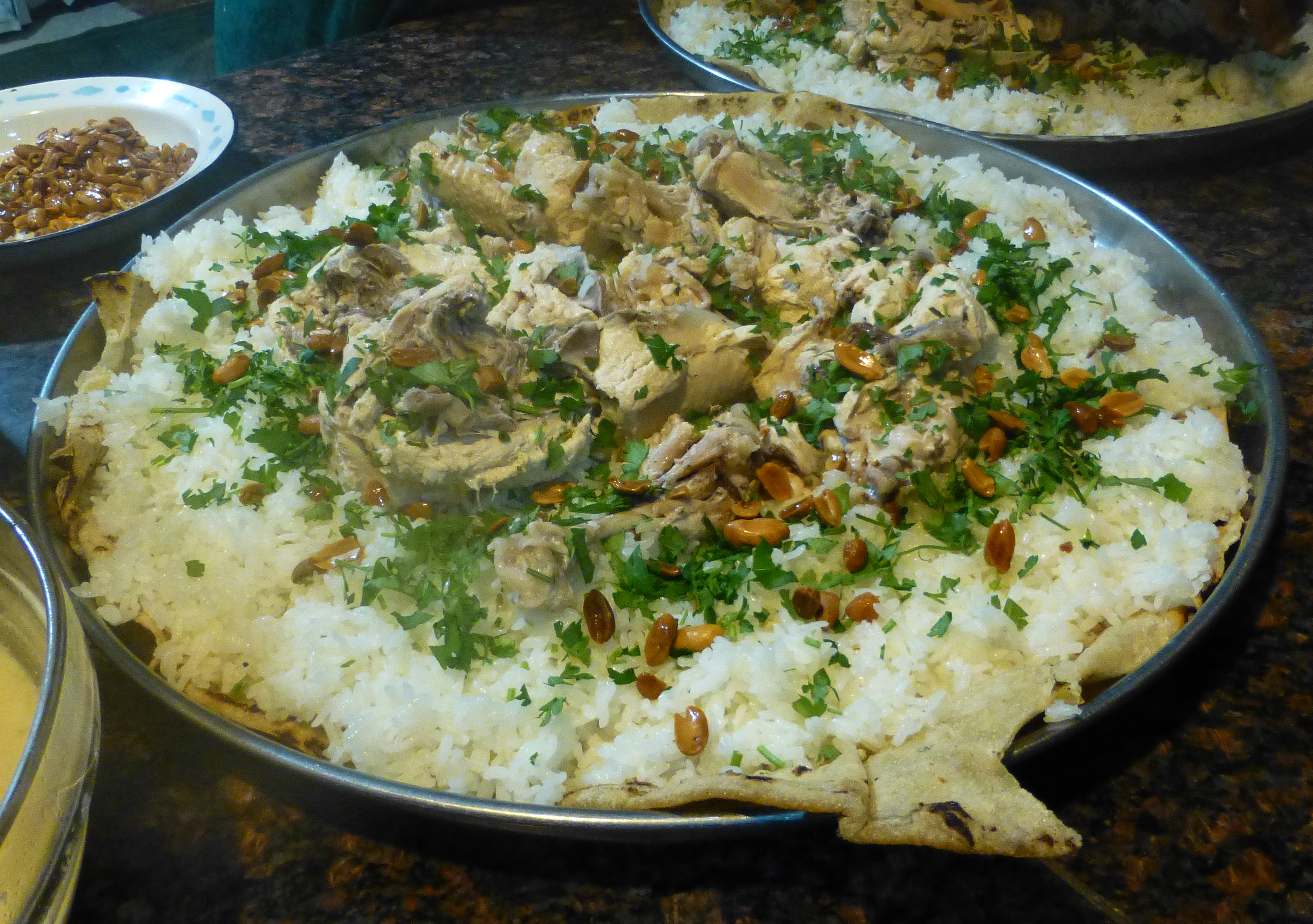 Préparation du mansaf dans la région de Pétra (Jordanie). Le plus souvent à base d'agneau, il est ici préparé avec du poulet.